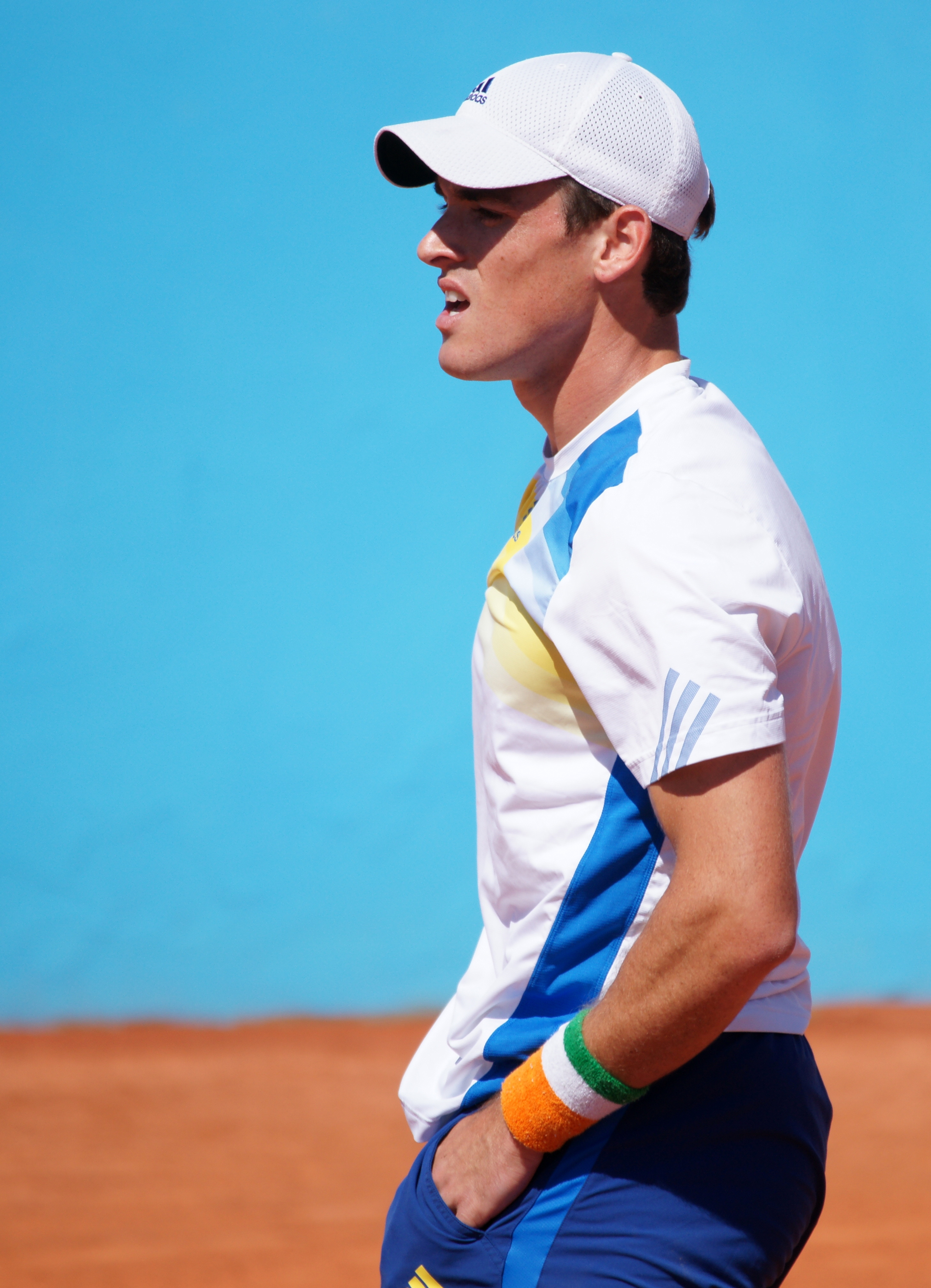 James McGee Nice Open ATP 2014